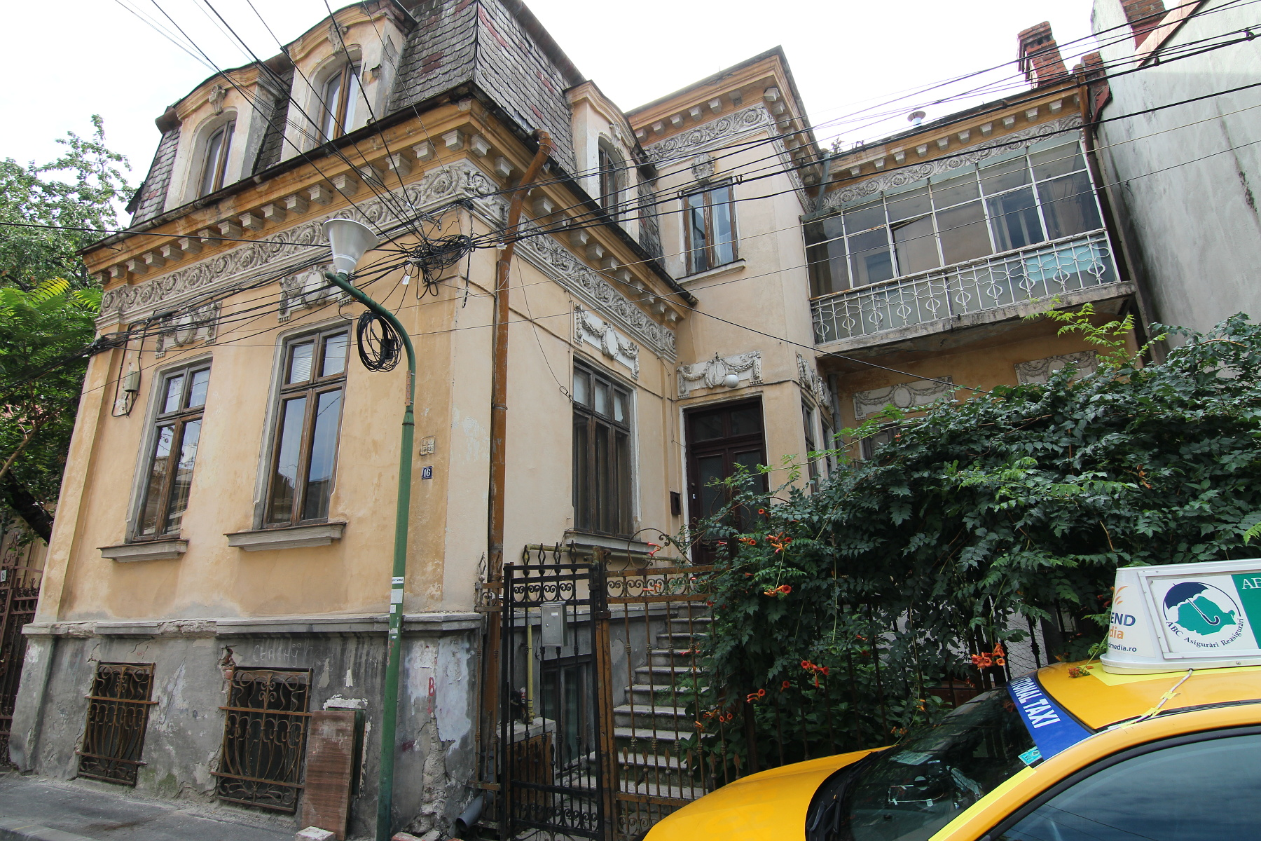 Casă pe Stelea Spătarul